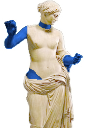 Vénus d'Arles - Les restaurations de Girardon